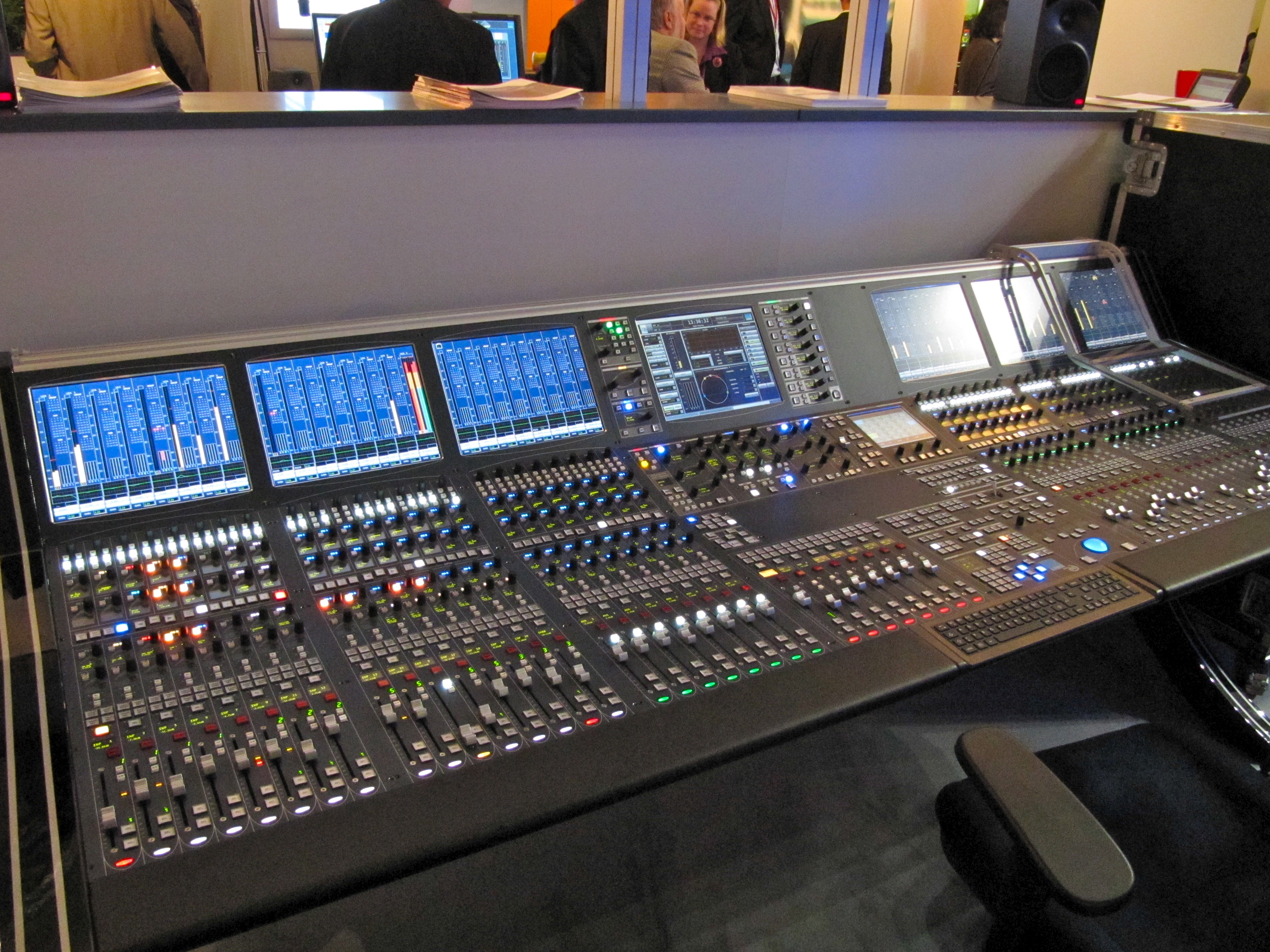 Lawo mc266 @ IBC 2009